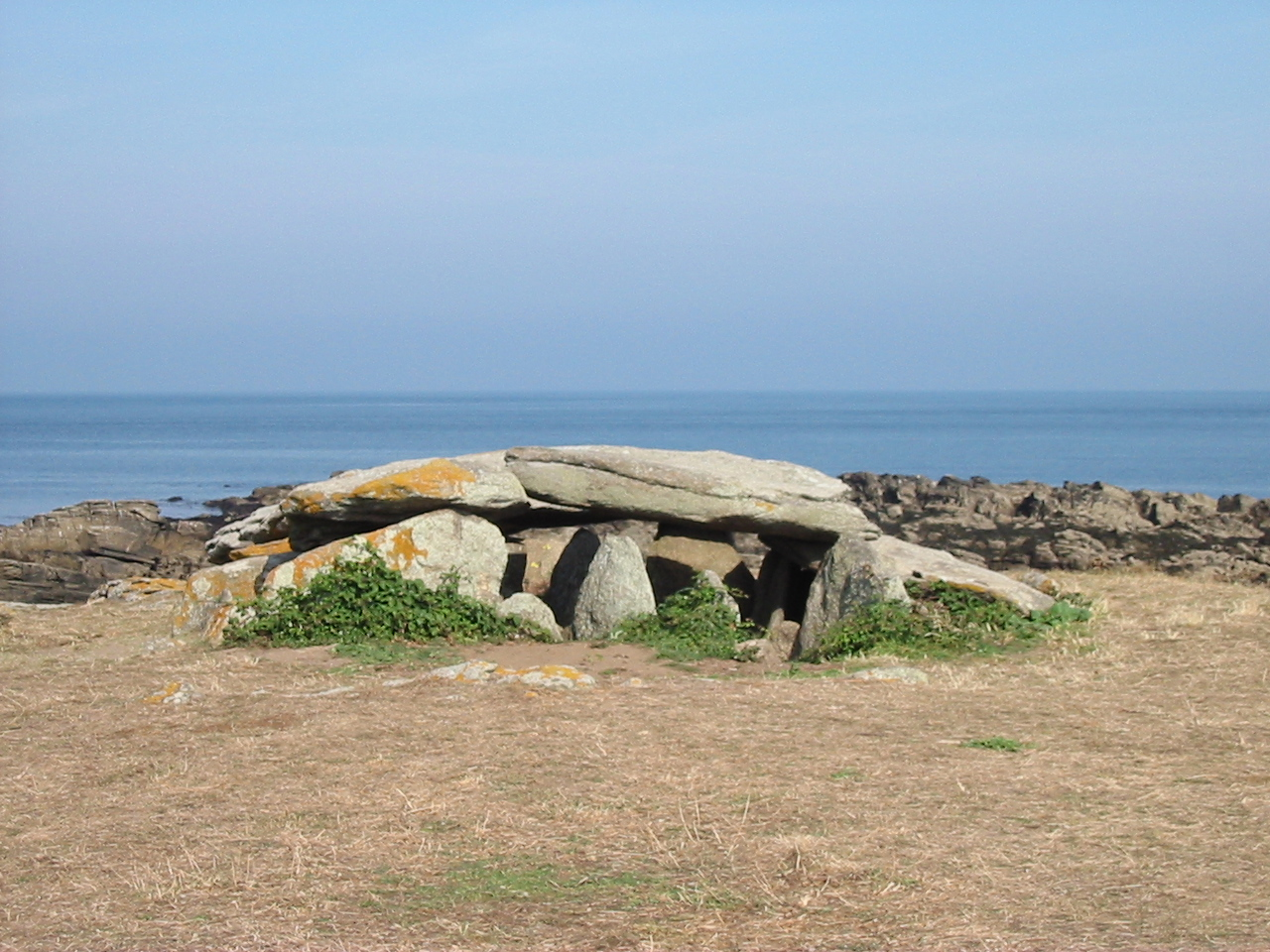 Ile d'Yeu - Dolmen de la Planche-à-Puare